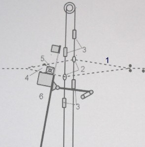 Proslup na tkacim stroji